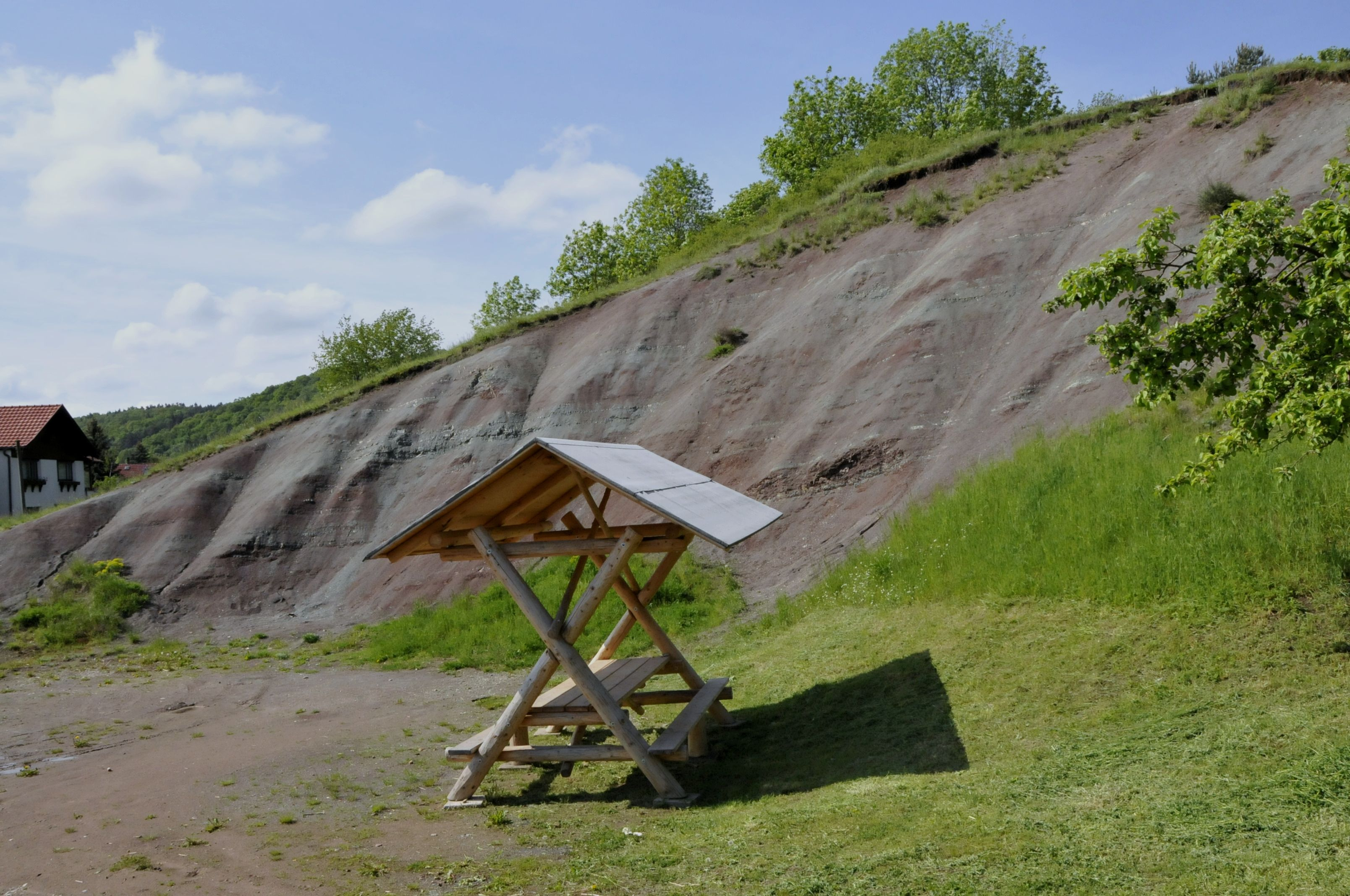 Geologische Aufschlüsse - Bad Lands - in Seebergen